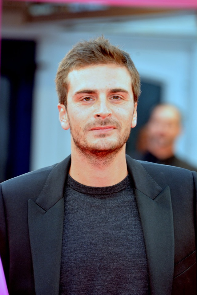 Roman Kolinka Deauville 2019